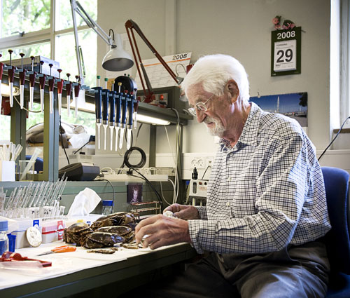 90-årige Jens Christian Skou i laboratoriet.